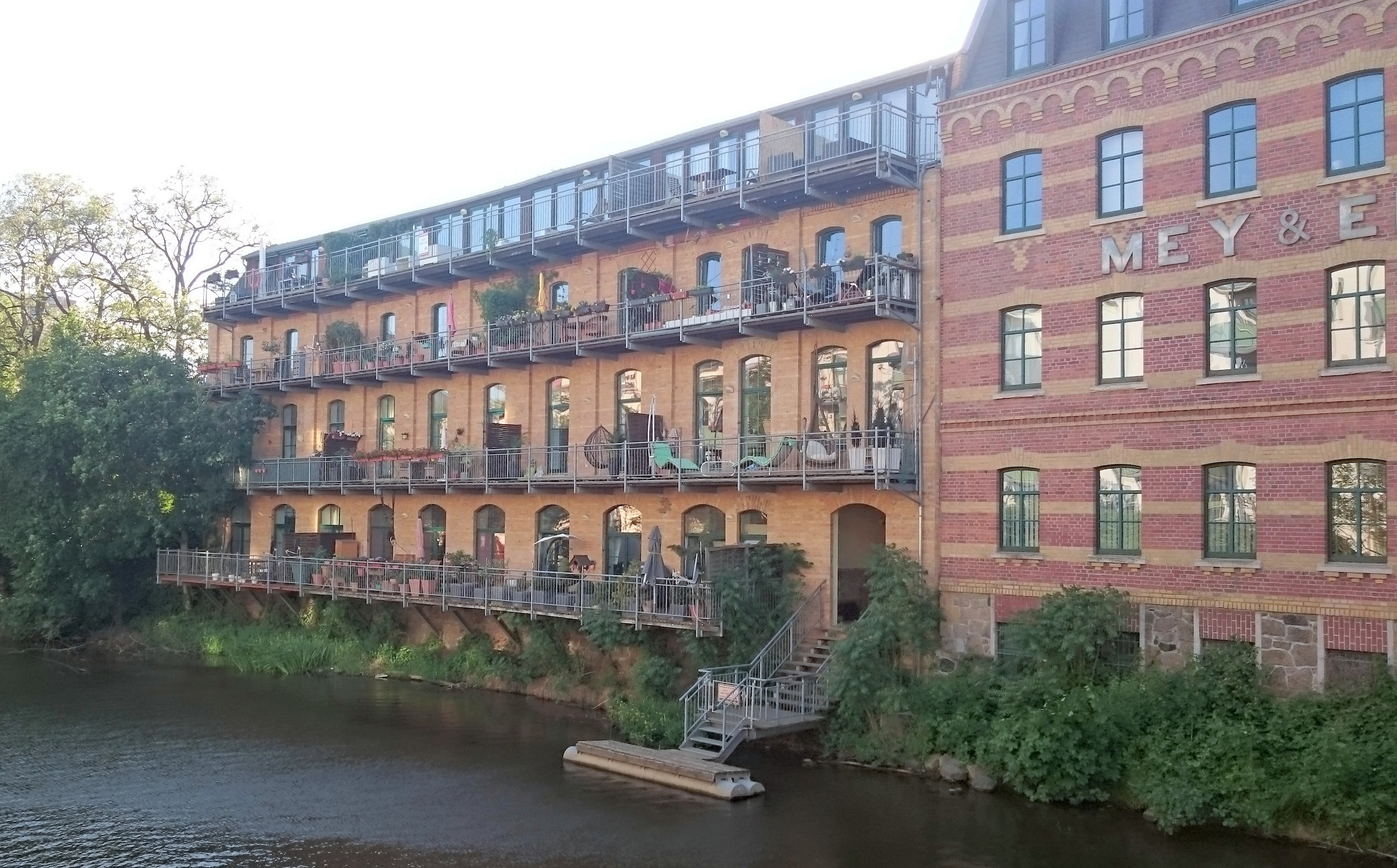 Leipzig, Nonnenstr. 7, Mai 2018.